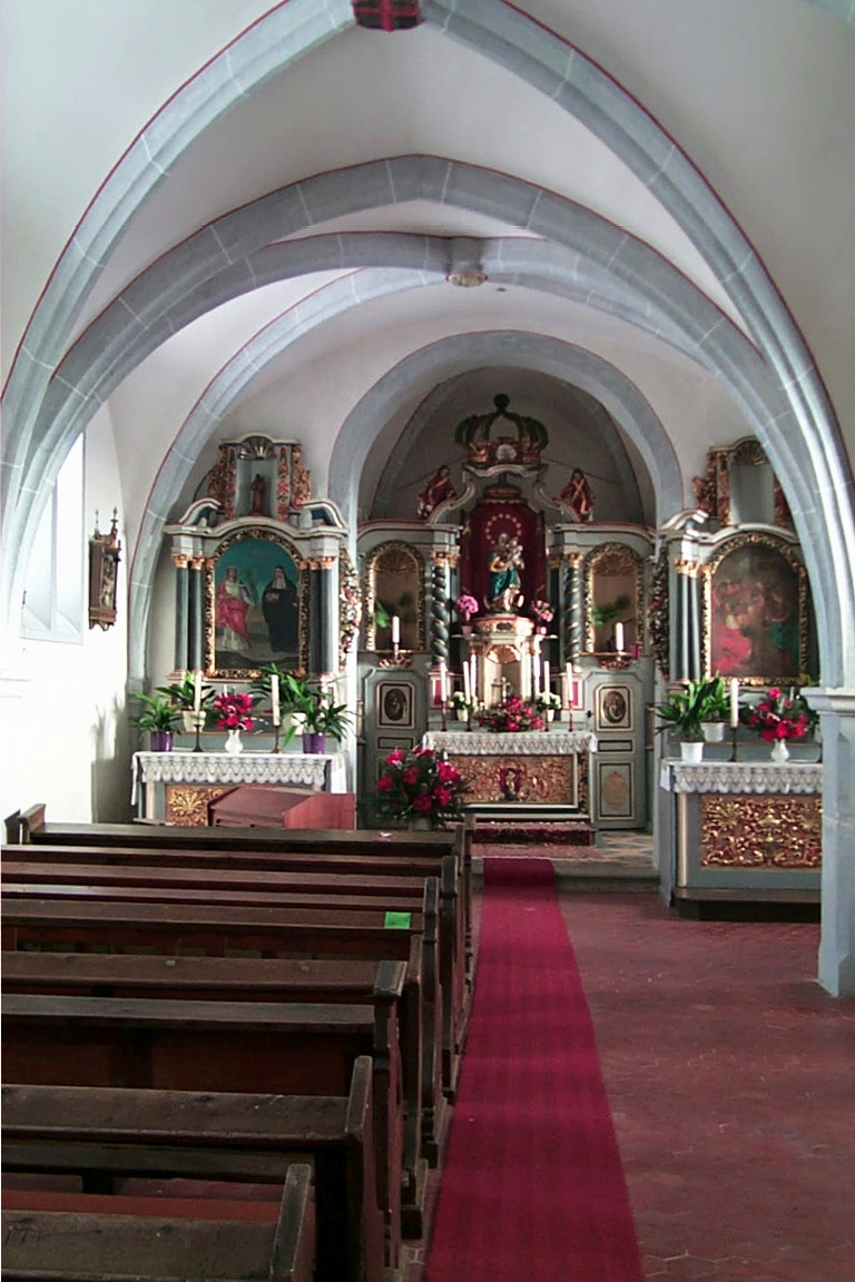 Kapelle St. Rochus oberhalb von Nittel (oberhalb der Weinberge) - Blick ins Hauptschiff